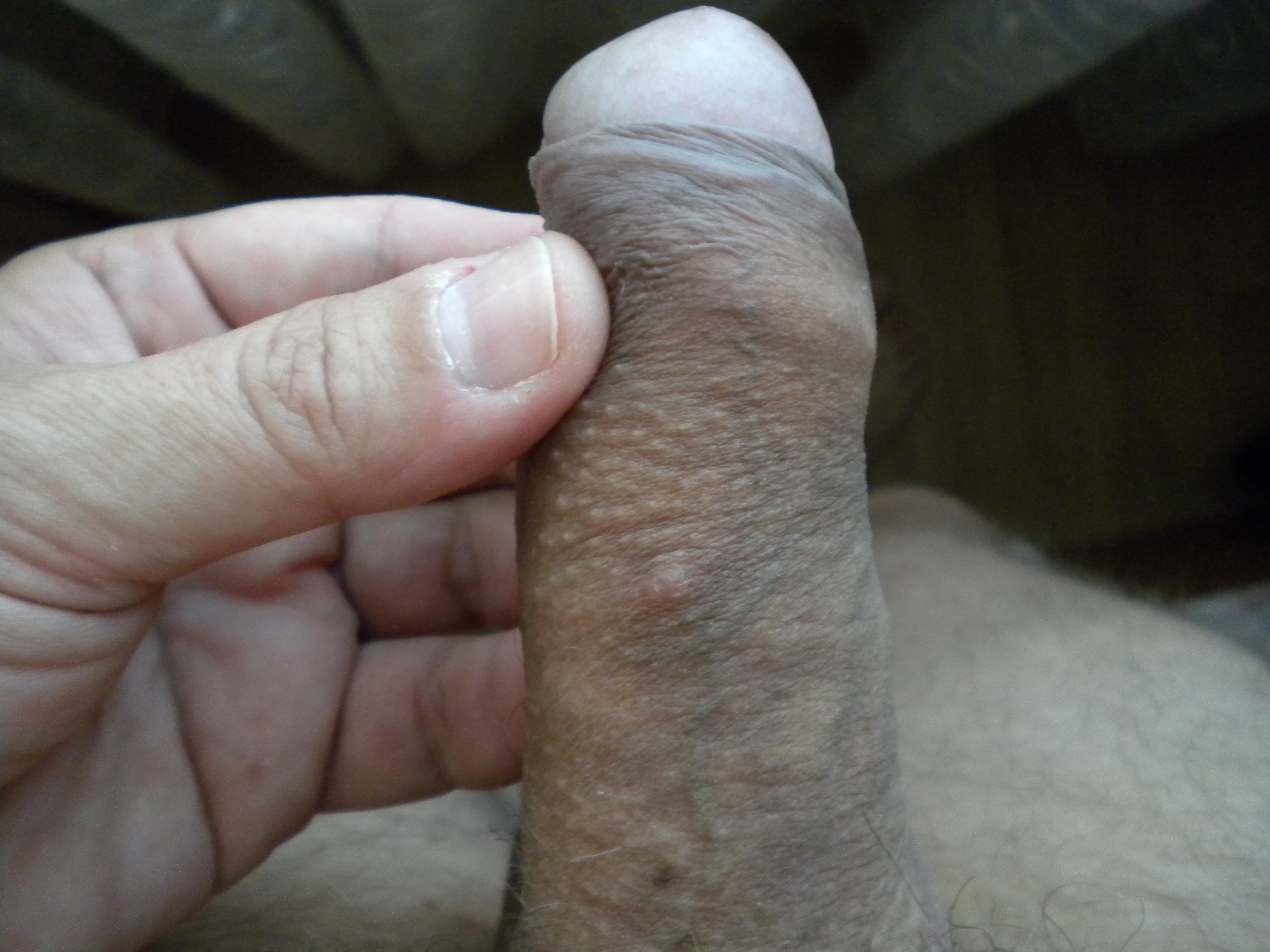 Скабиозная лимфоплазия на коже полового члена.